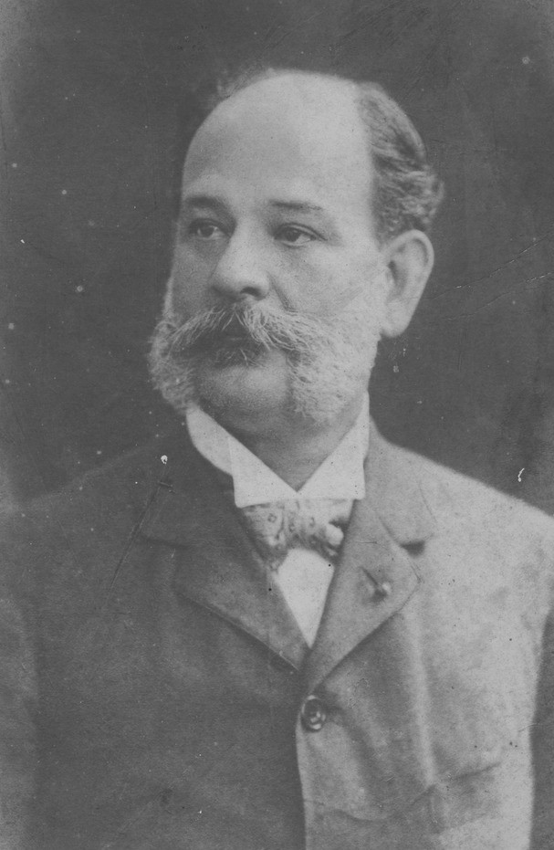 Sr. Homero Morla - Biblioteca Municipal de G(uaya)quil - (Biblioteca Municipal de Guayaquil DF000000003856)